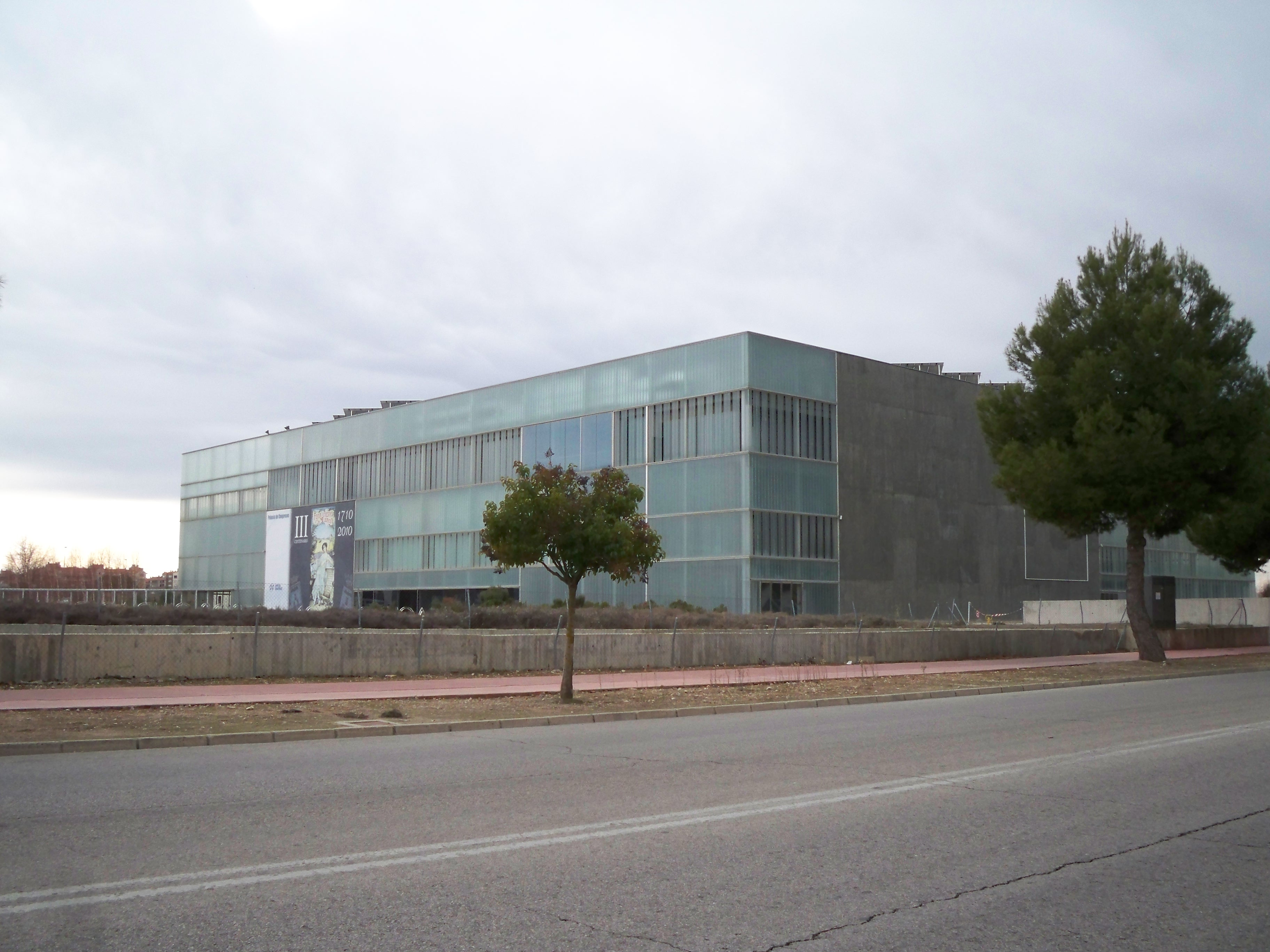 Palacio de Congresos de la ciudad de Albacete, situado en el Parque Empresarial de Campollano